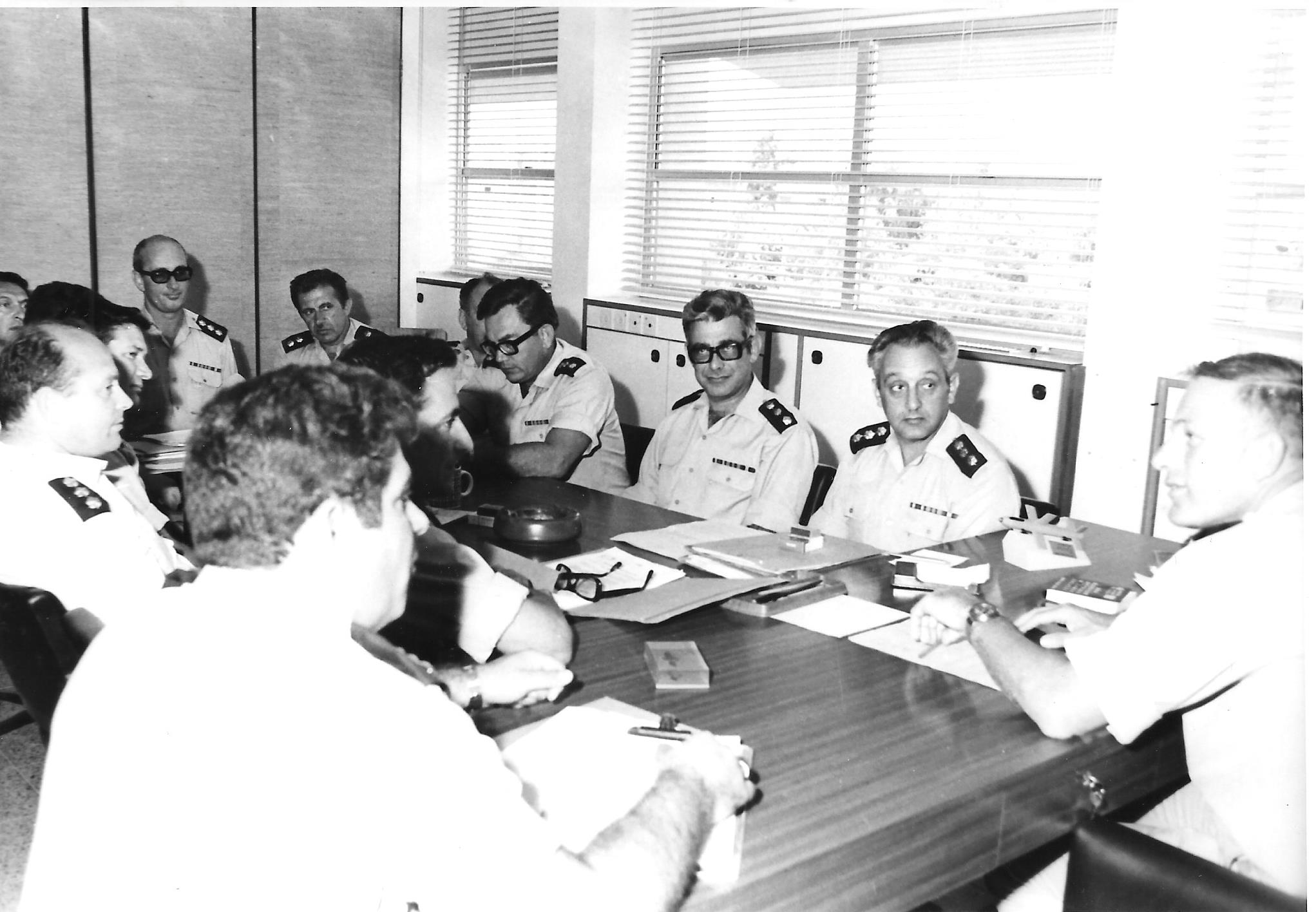 סגל פיקוד בכיר חיל הים במלחמת יום הכיפורים